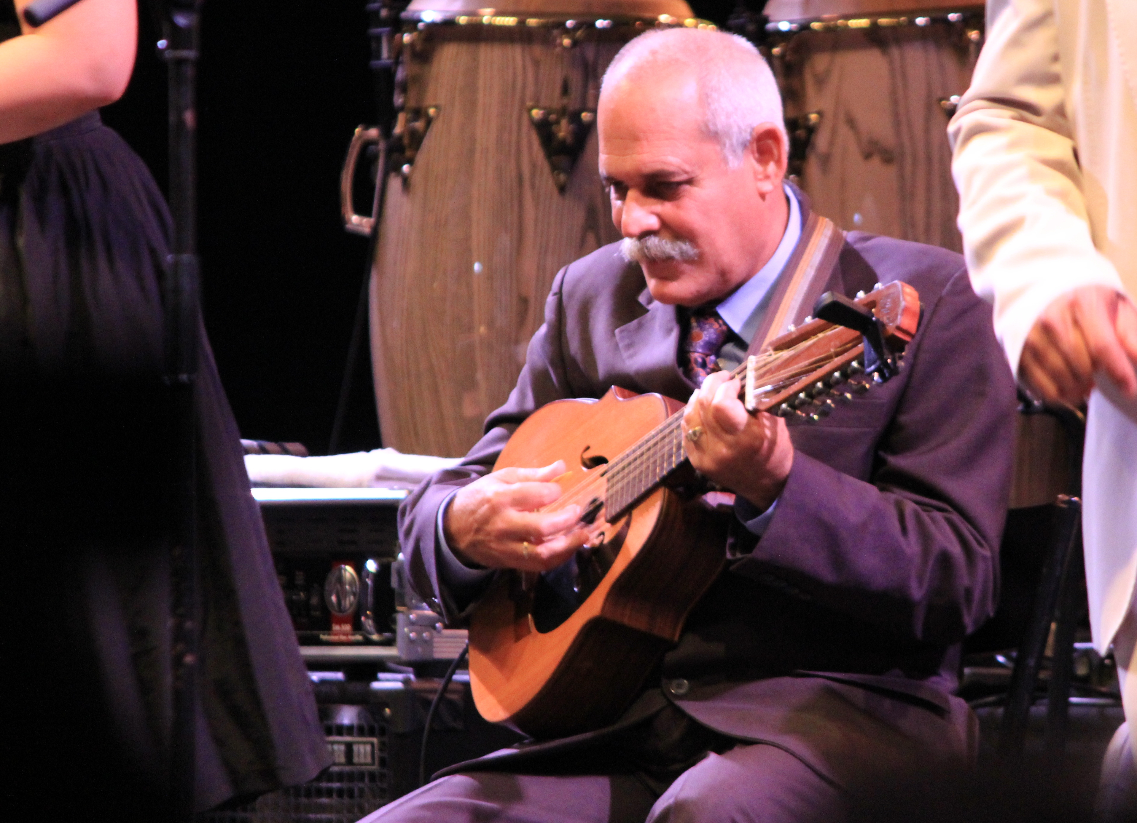 Orquesta Buena Vista Social Club pendant le Festival interceltique de Lorient avec Barbarito Torres